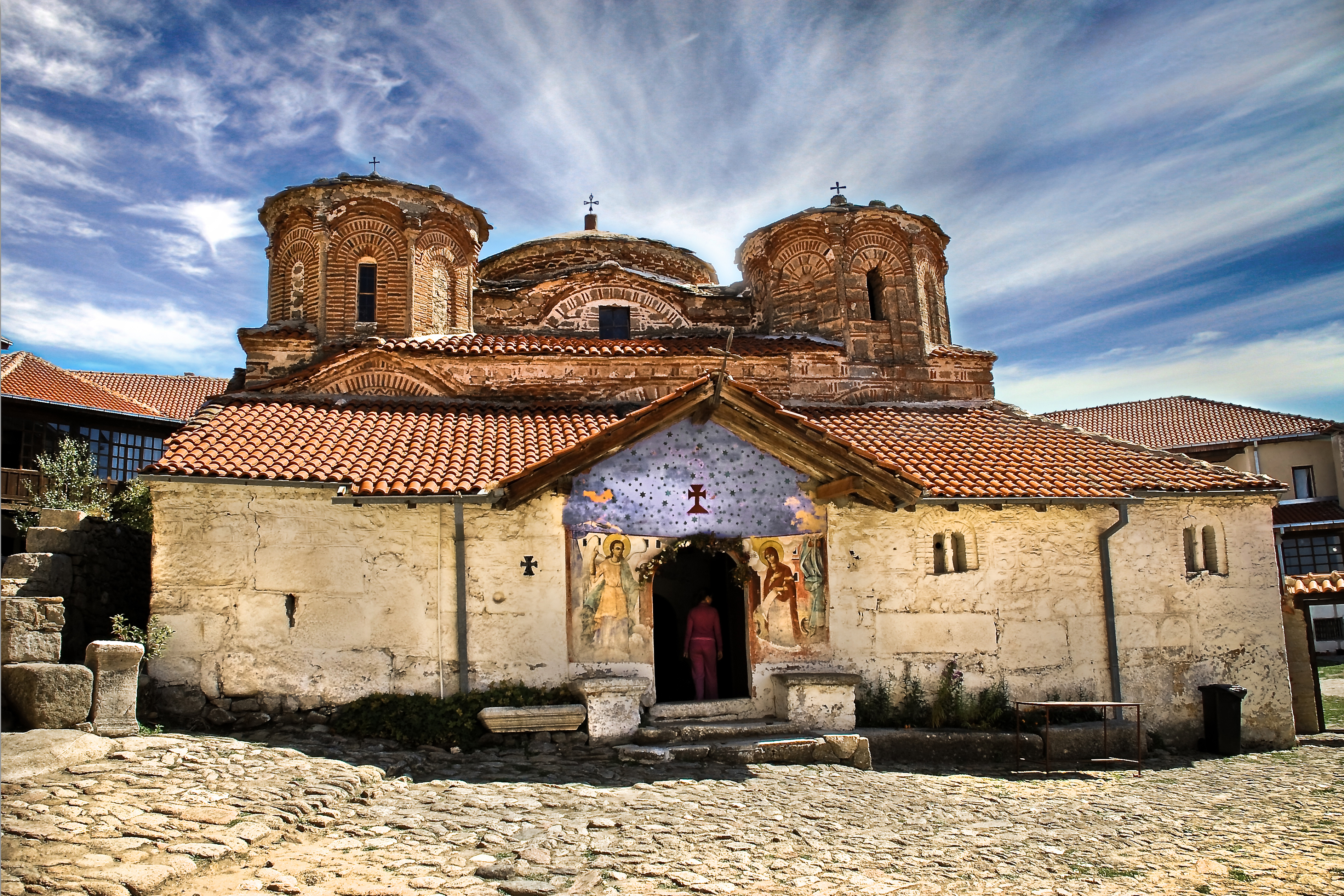 манастир Св.Богородица, Трескавец, Прилеп